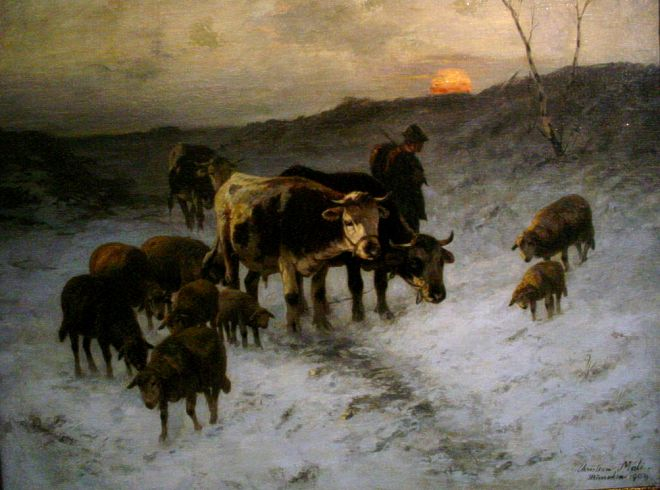 detail